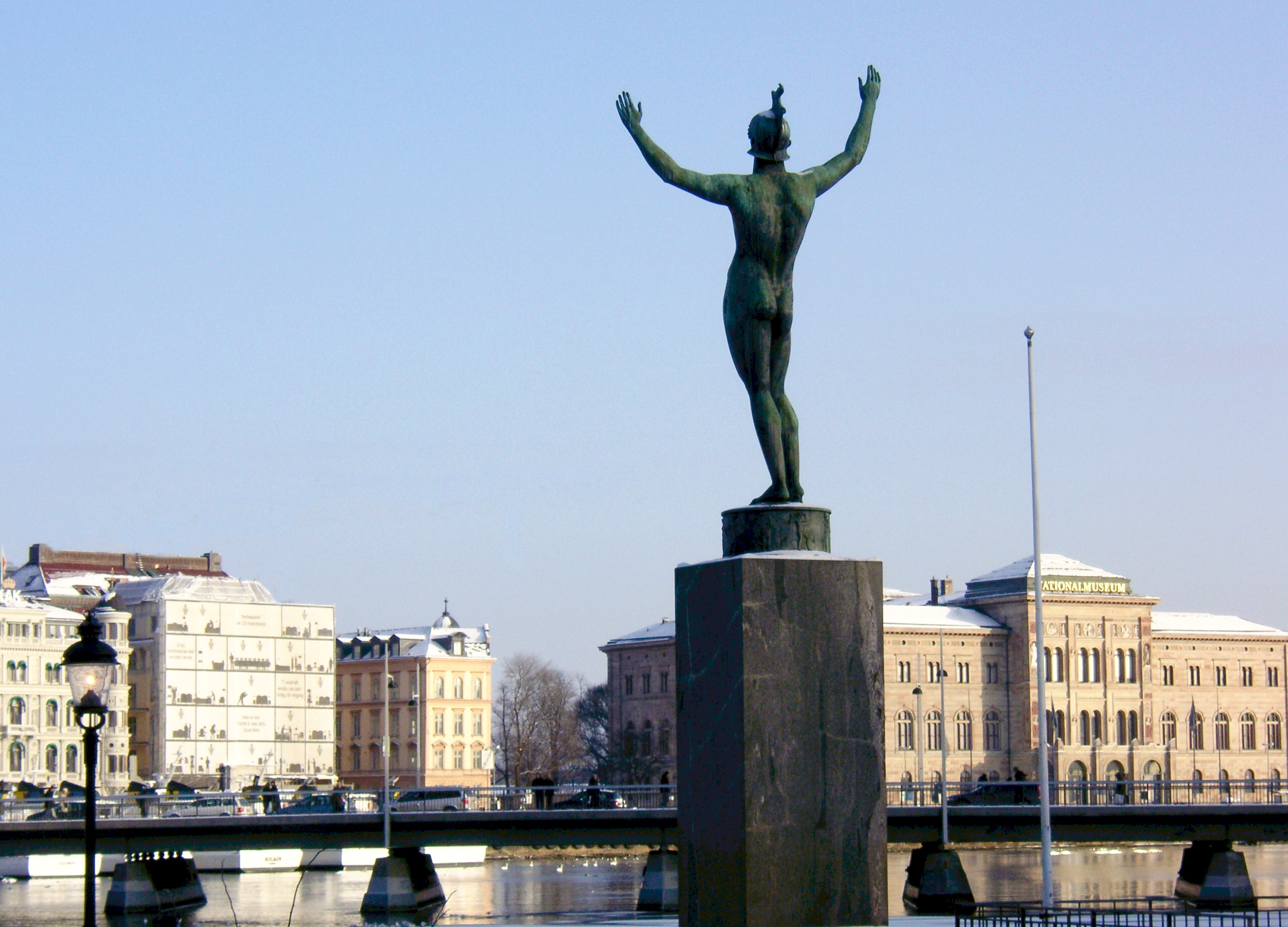 Solsångaren av Carl Milles på Strömparterren i Stockholm